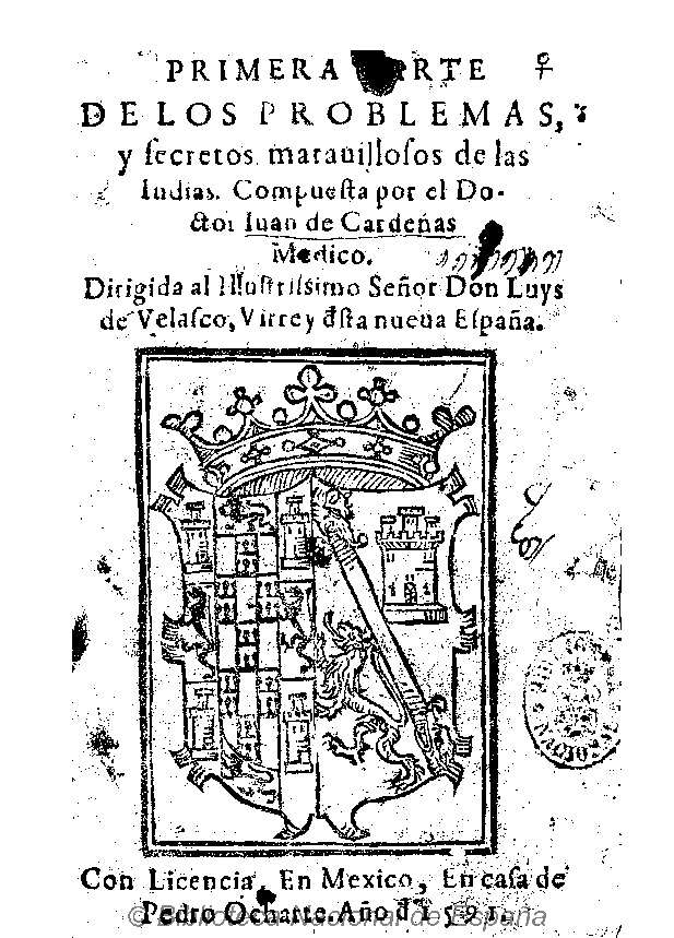 Primera parte de los problemas y secretos marauillosos de las Indias, Compuesta por el Doctor Iuan de Cardenas, Medico ... Autor: Cárdenas, Juan de (1563-1609) Fecha: 1591 Datos de edición: En Mexico, en casa de Pedro Ocharte